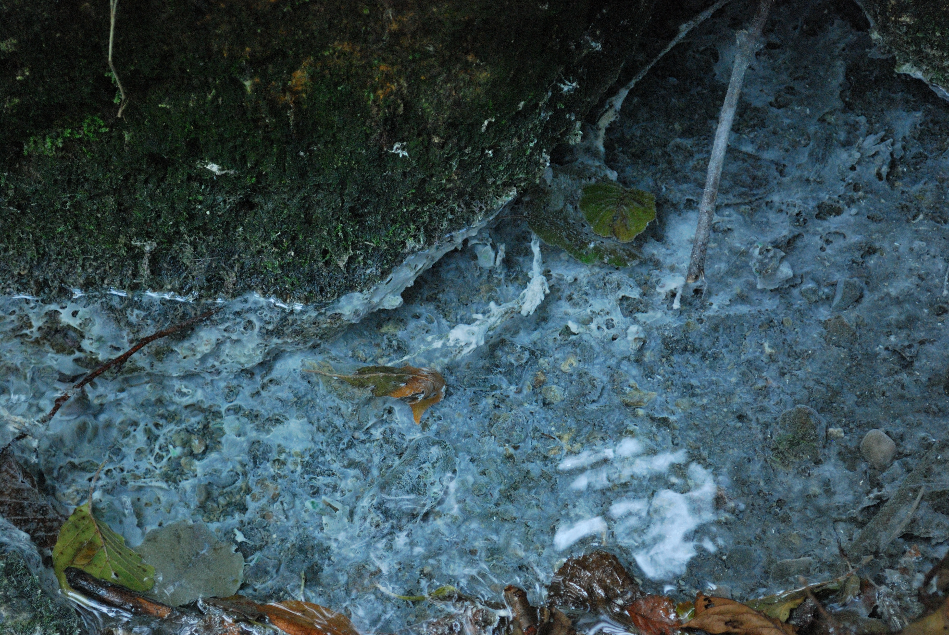 Das Foto zeigt eine schwefel- und kalkhaltige Quelle mit Mineralablagerungen innerhalb des Sippenauer Moors (Naturschutzgebiet NSG-00009.01, Geotop-Nr. 273Q001) im Landkreis Kelheim, zugehörig zum Gemeindegebiet Saal an der Donau in Niederbayern, Deutschland.